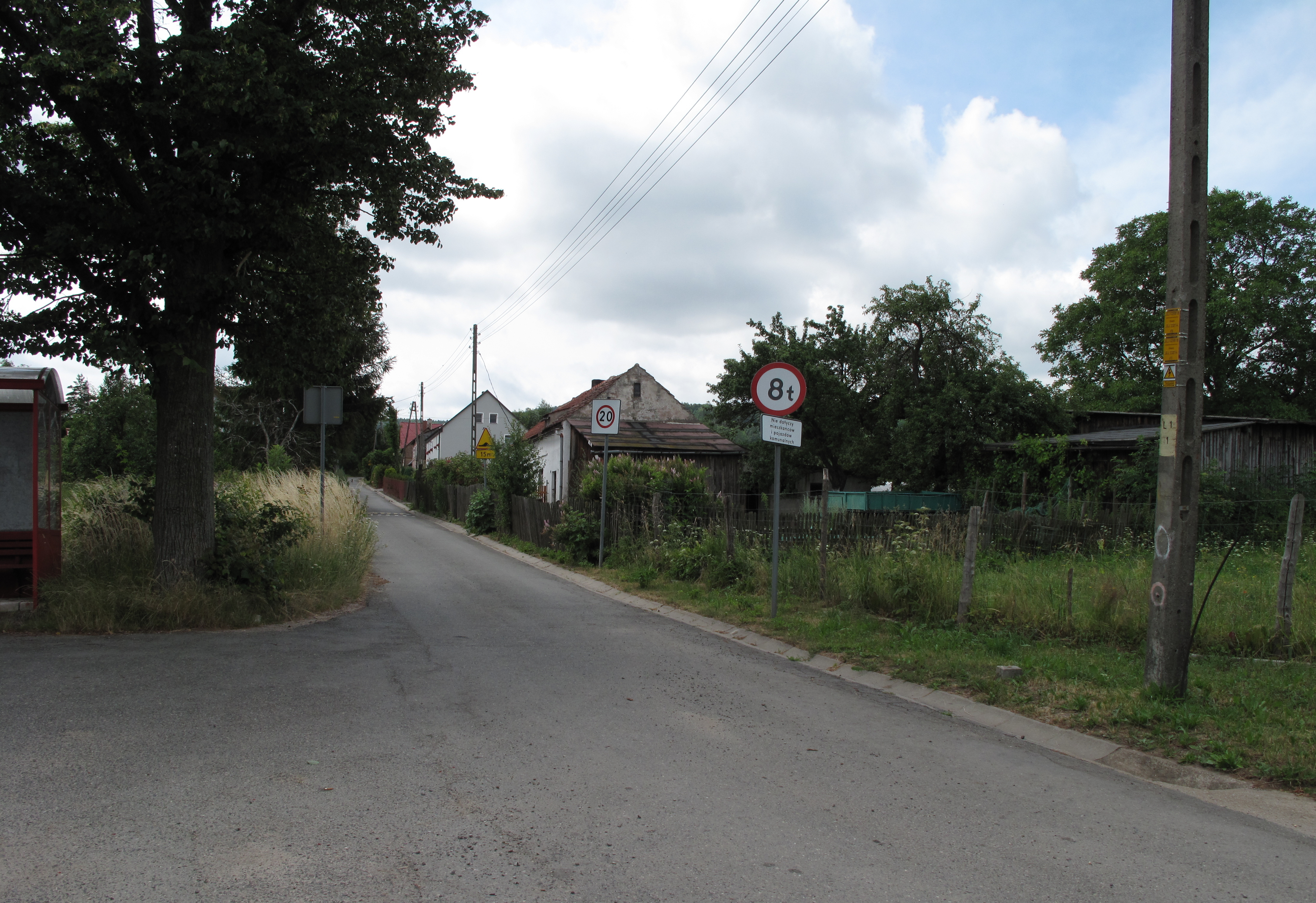 Wierzchosławiczki. Česká republika.